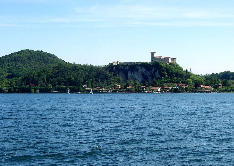 Rocca di Angera vista da Arona